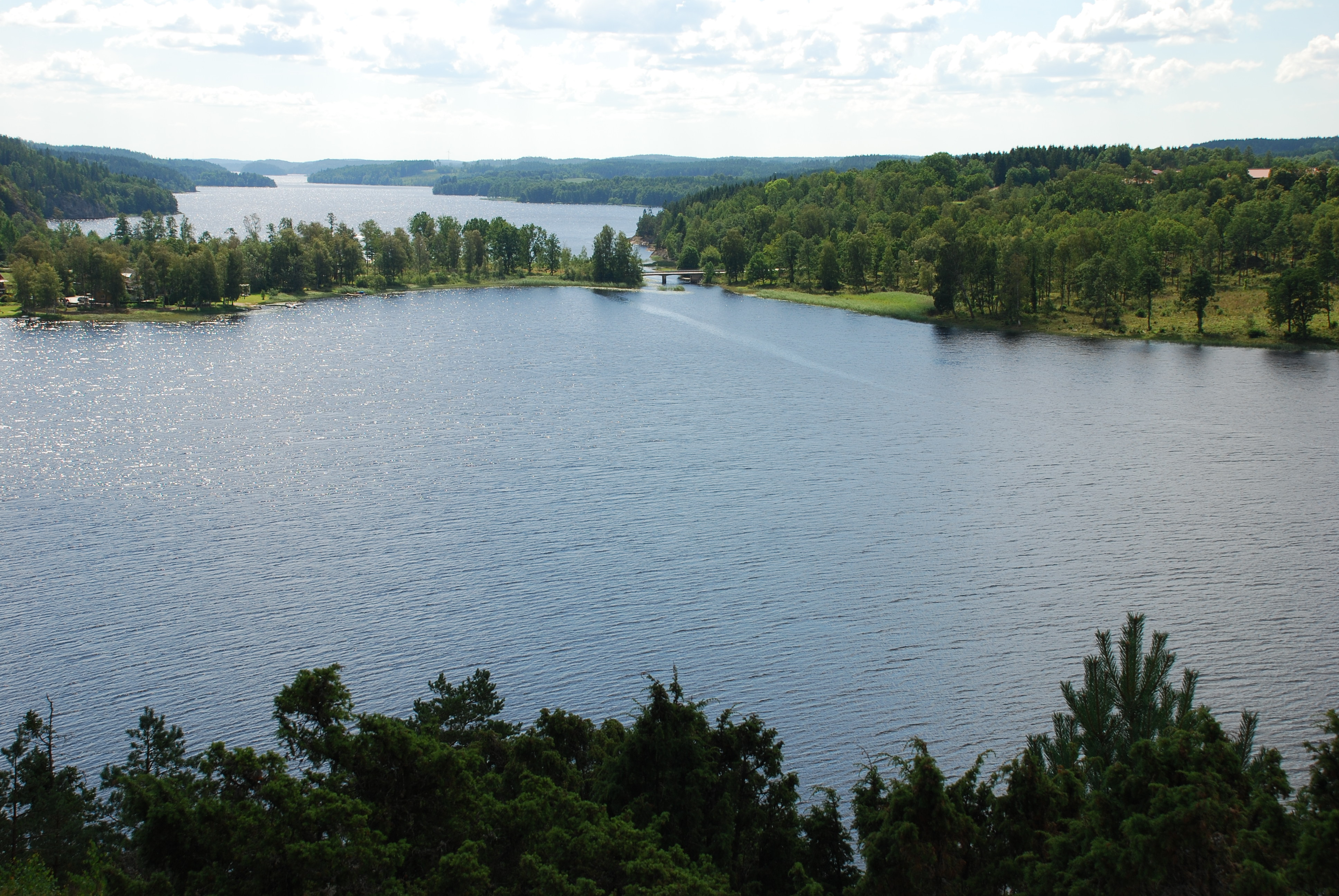 Södra Bullaresjön i Naverstads socken i nuvarande Tanums kommun i Bohuslän, sedd från Olsborgs borgruin.